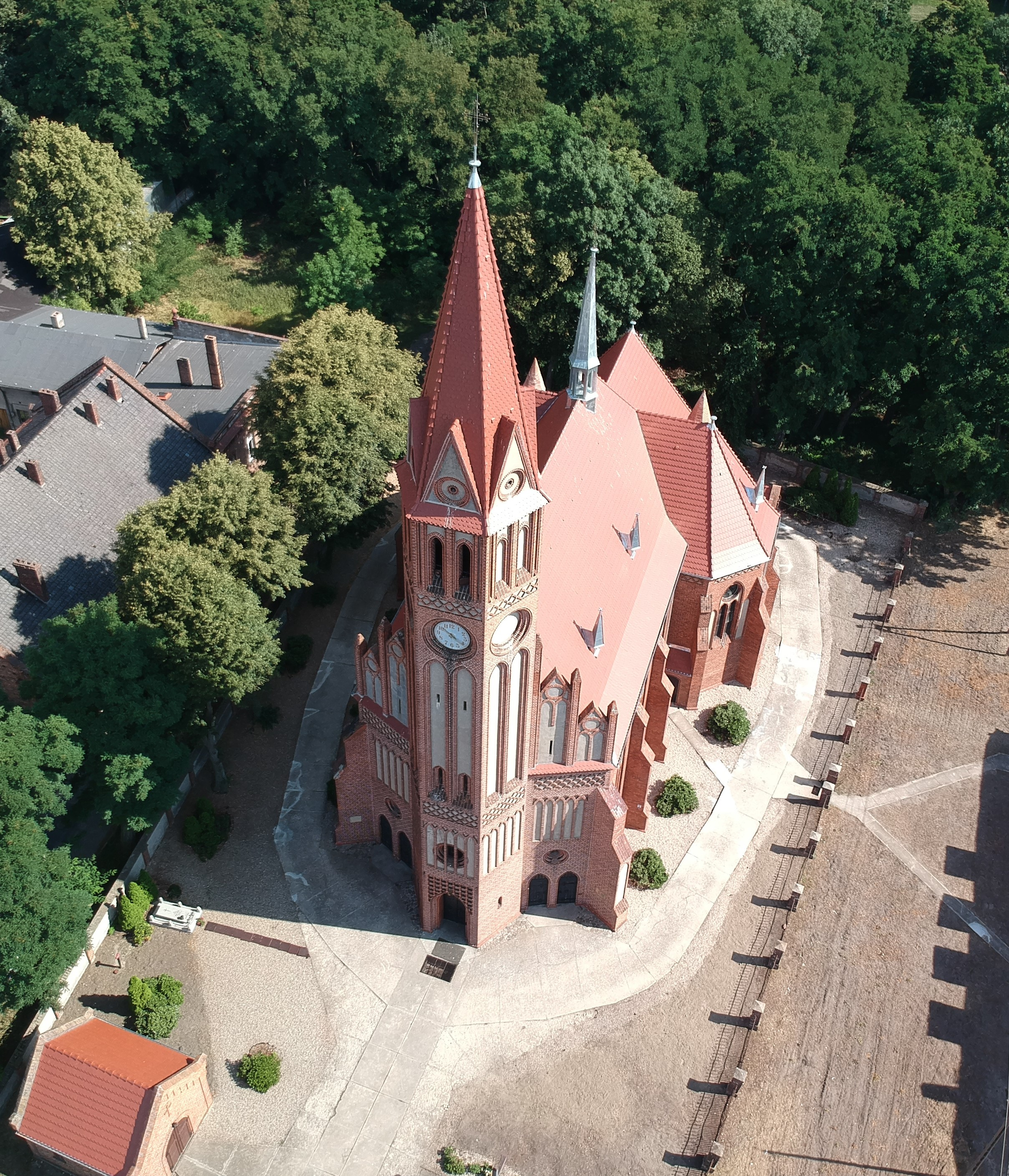 Obiekt kościoła z góry